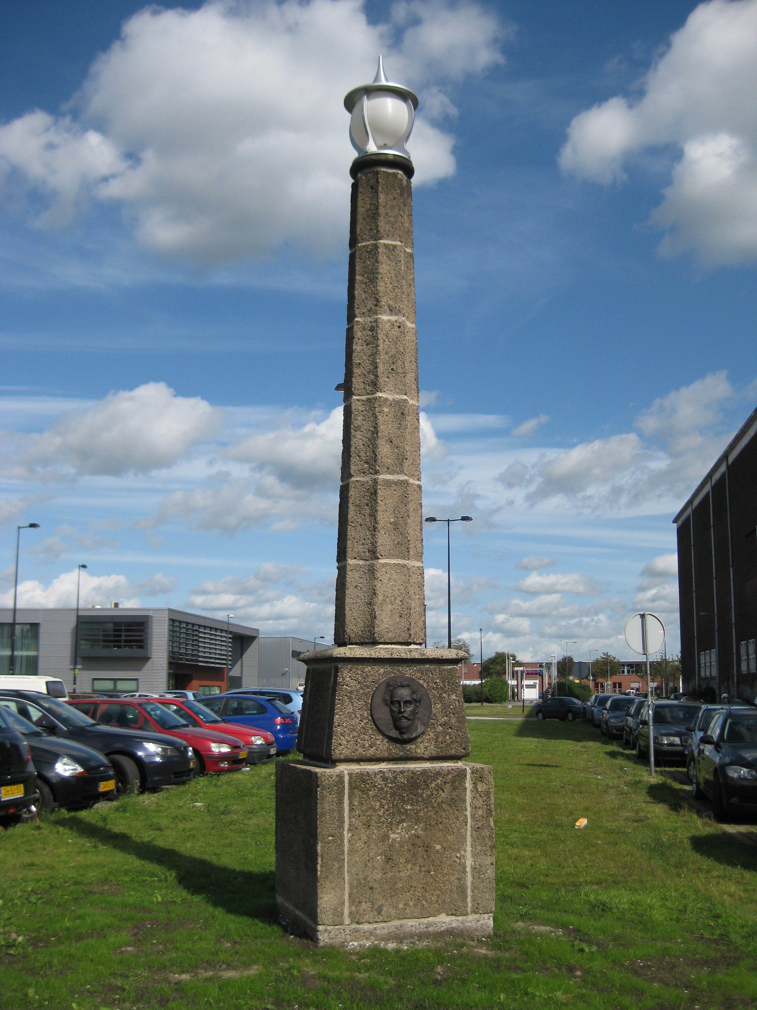 Deze gedenkzuil met de beeltenis van Daniël Goedkoop werd in 1944 door het personeel aangeboden aan de toenmalige Nederlandse Scheepsbouw Maatschappij ter gelegenheid van het 50 jarig bestaan. Na de sluiting van de NDSM in 1984 is de zuil verplaatst naar Tuindorp Oostzaan maar op verzoek van oud werknemers is hij in september 2011 weer terug op het terrein van de NDSM in Amsterdam Noord.